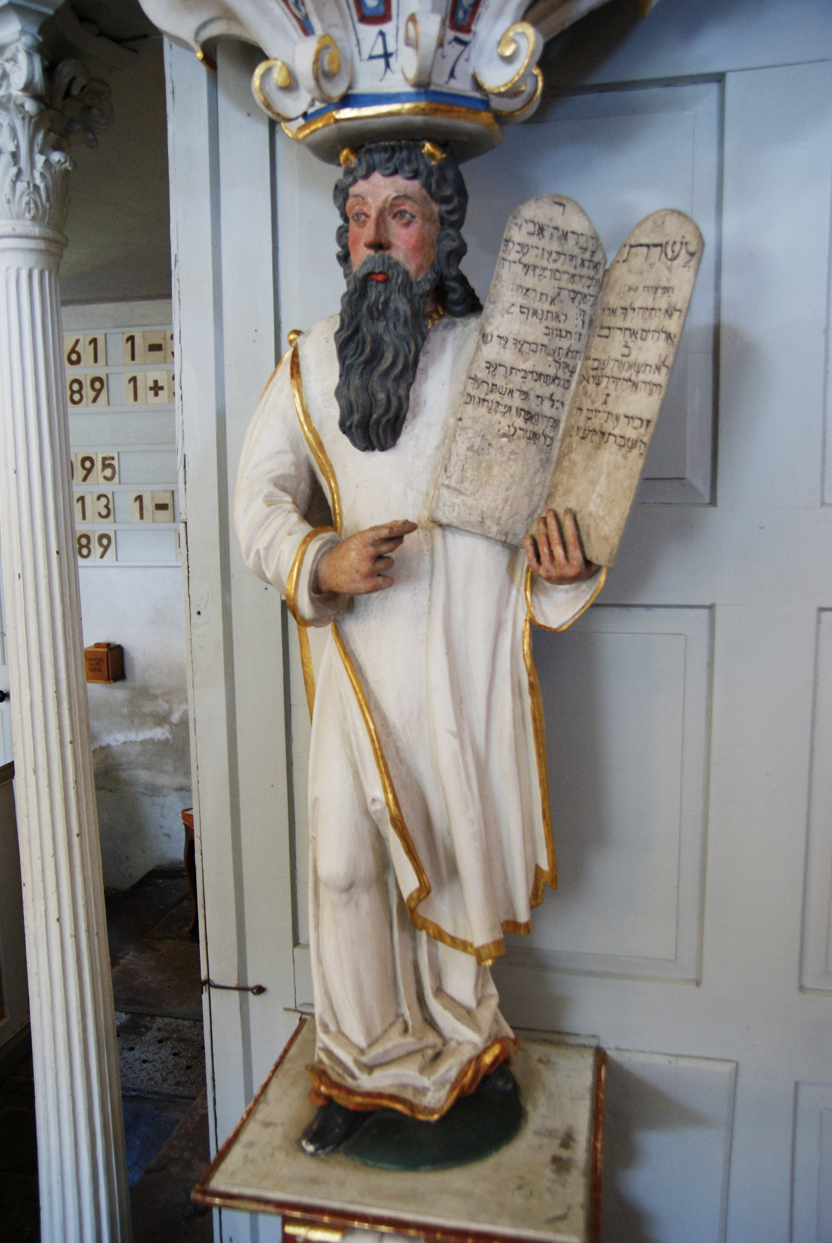 Kirche Großolbersdorf, Mose